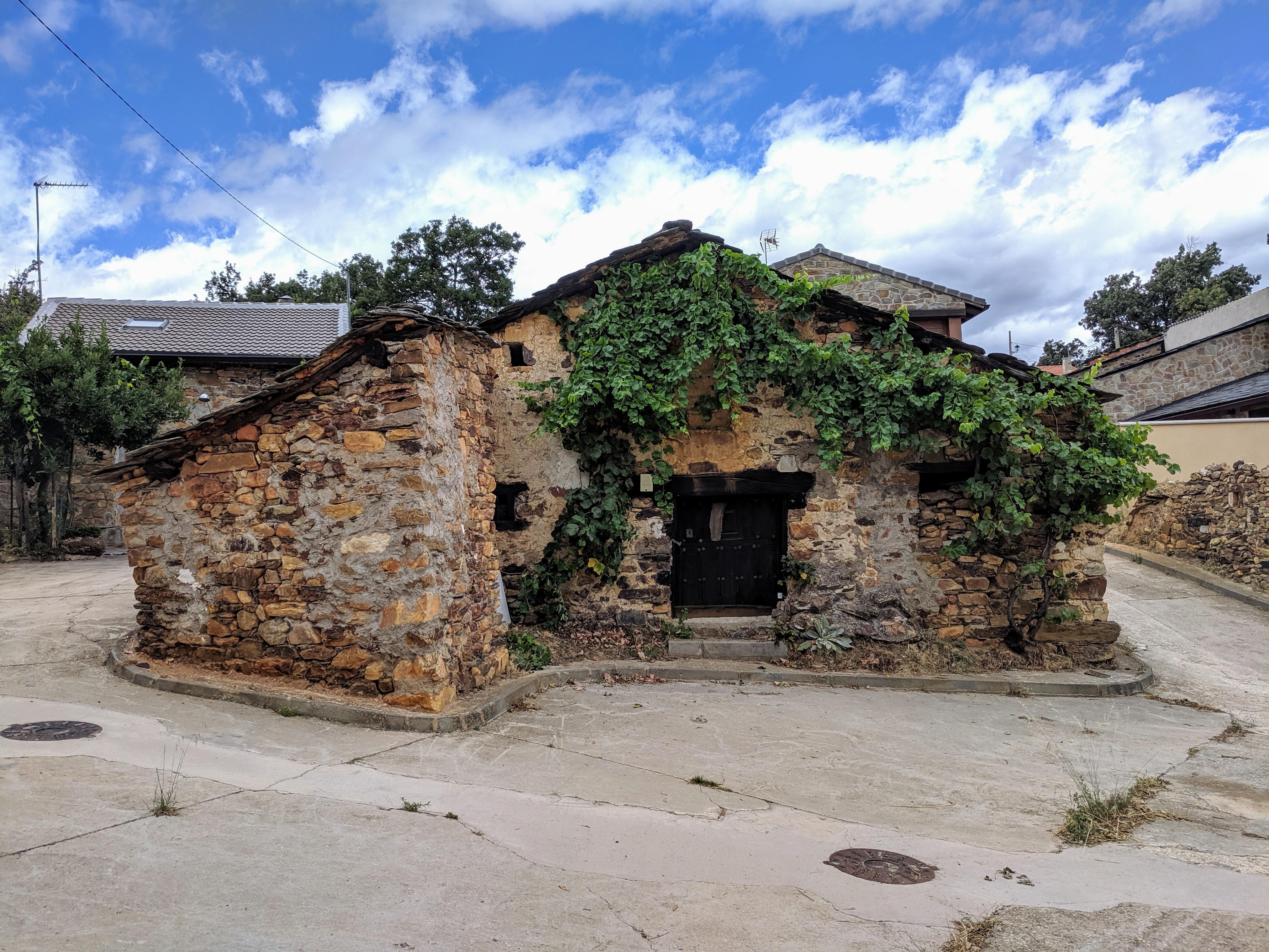 Arquitectura dorada en Semillas (Guadalajara, España).